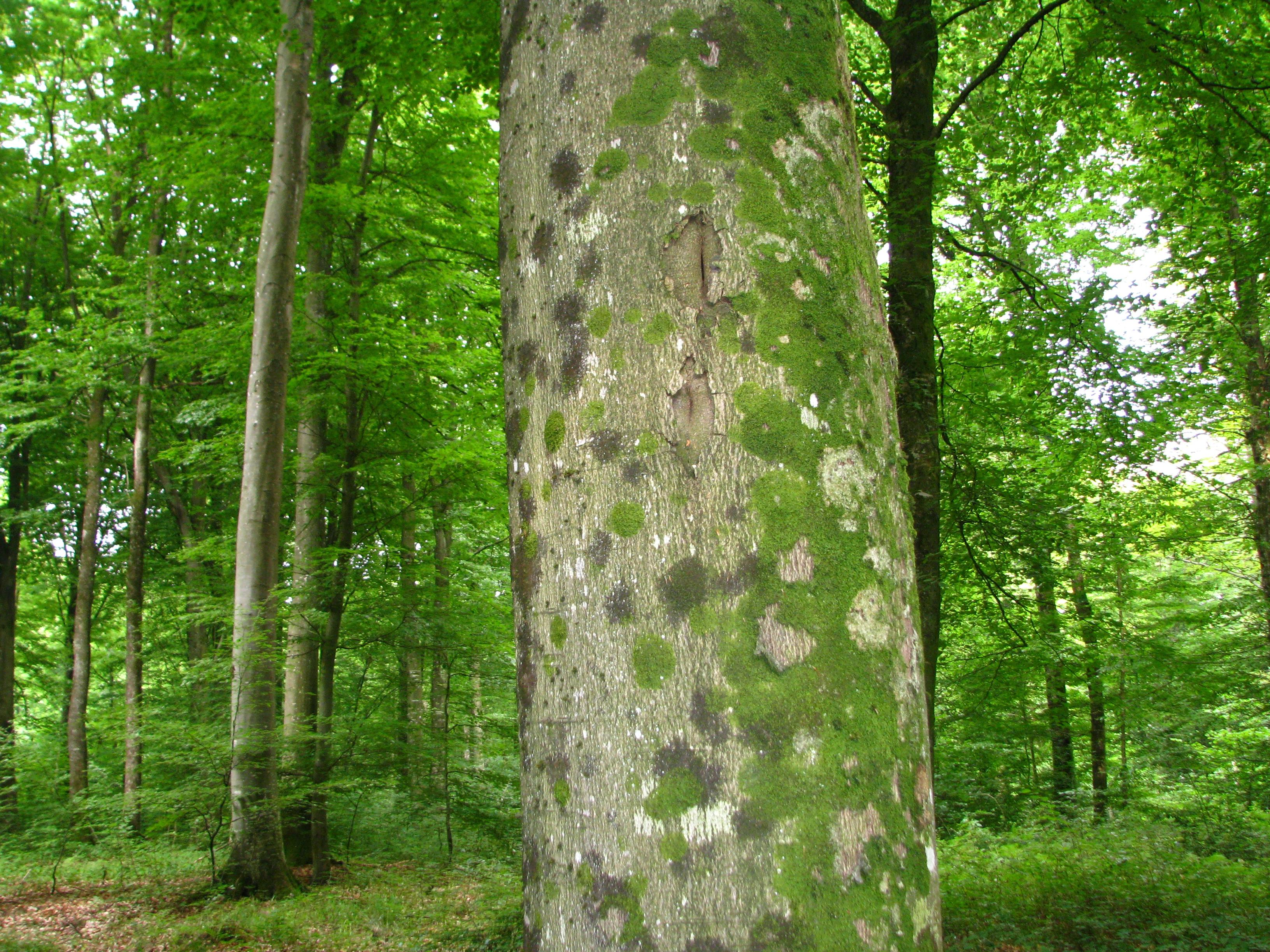 Stechpalmen-Buchenwald in den Argonnen (Forges-sur-Meuse). Man beachte die beiden überwallten Einschusslöcher aus der Zeit des 1. Weltkriegs.